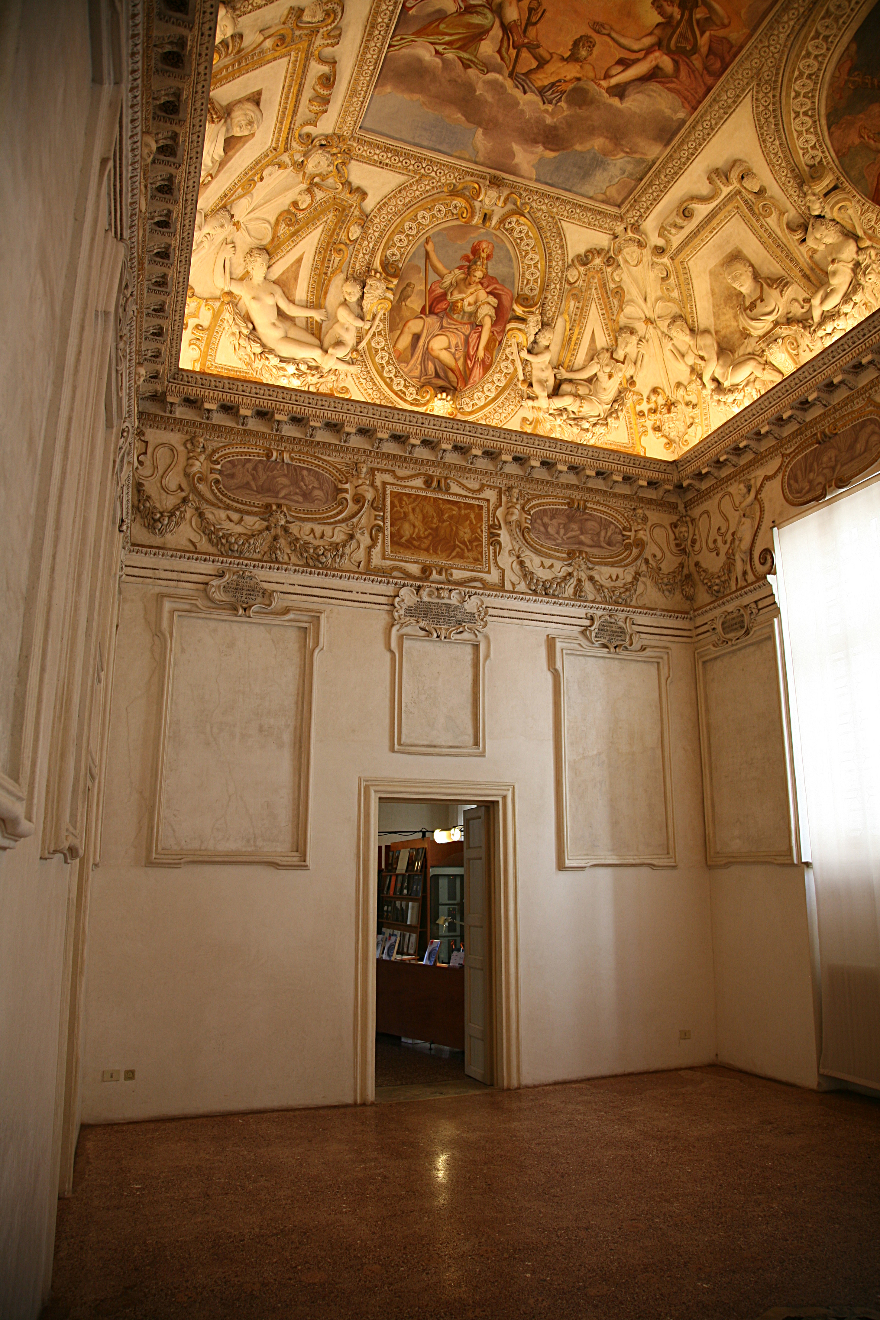 Palazzo Barbaran Da Porto in Vicenza